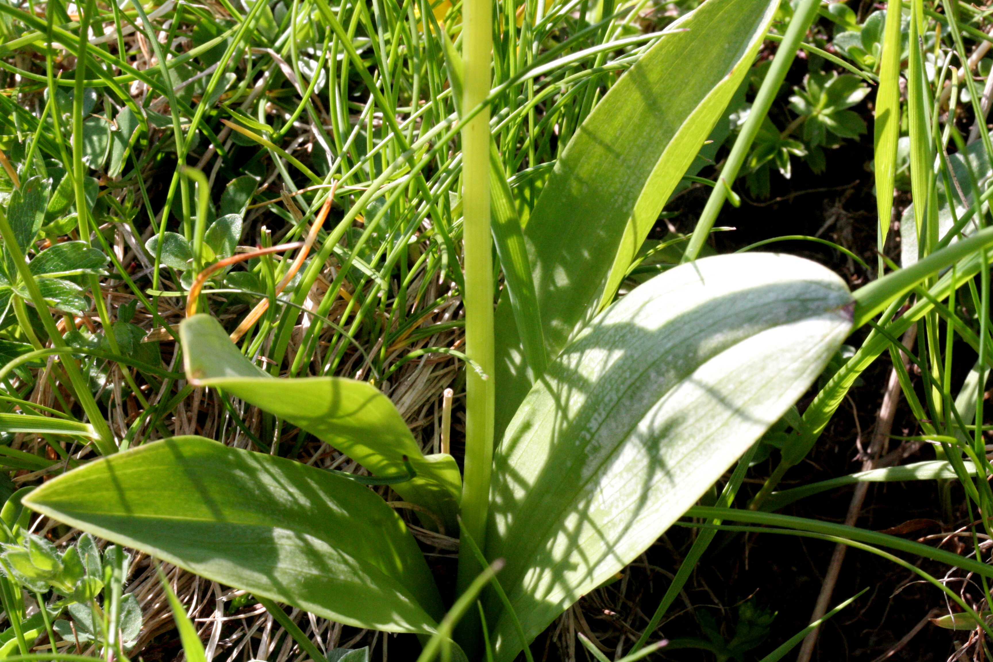 Platantera comune - Località: Cima Sappada, Sappada (BL), 1290 m s.l.m.